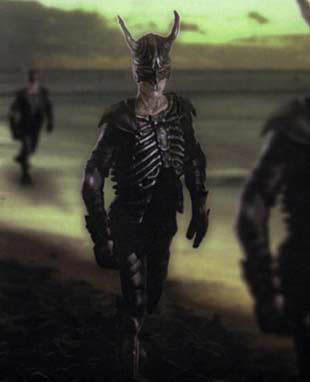 Kostüm von Till Fuhrmann und Hannes Heiner Foto: Stephan Gustavus